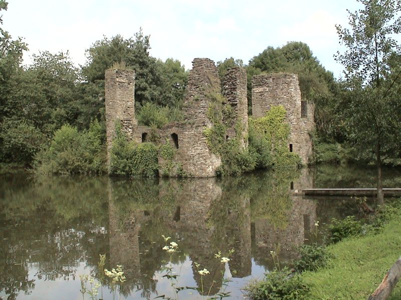 Ruine Eibach: Burgruine zwischen Scheel und Gimborn